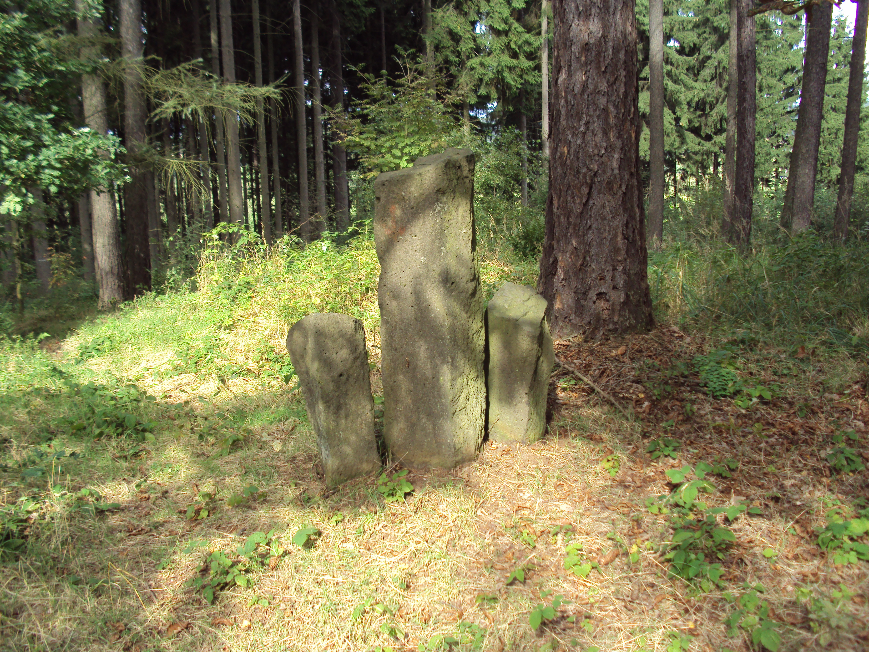 Na nezřetelném vrcholu Mariánské výšiny Obora 371 m. n.m poblíž Zakup, u zelené cesty KČT 3953 je skupina vrcholových kamenů